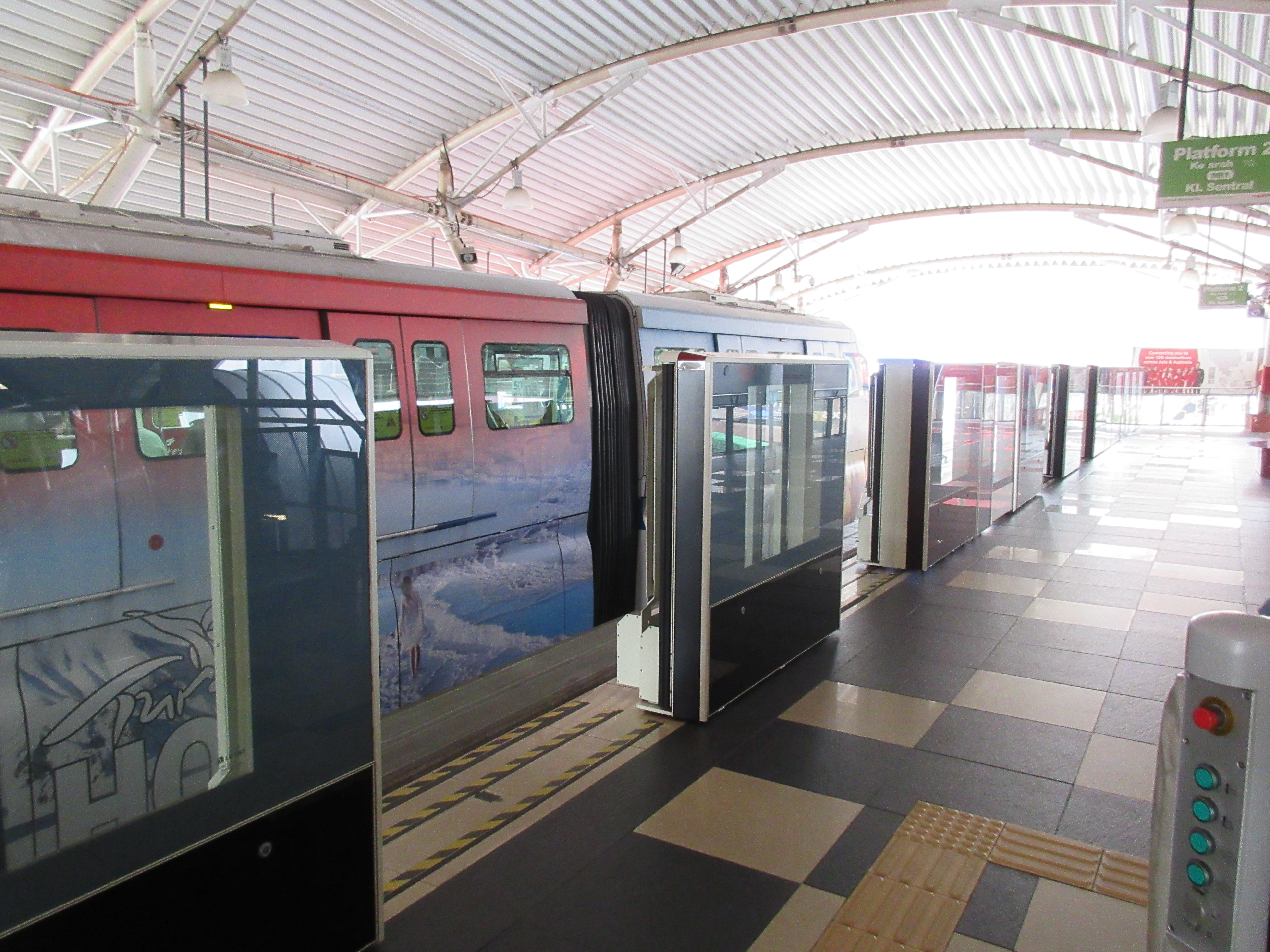 KLモノレール ブキッ・ビンタン駅プラットホーム